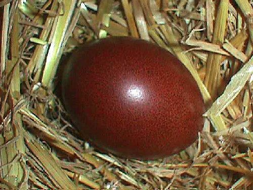 Très bel oeuf Typique de la Marans